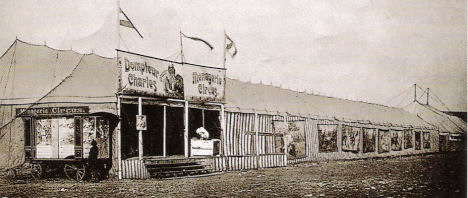 Menagerie Circus des Dompteur Charles (1898) (i. e. Carl Krone) Zwischenstation zwischen der mobilen Menagerie Continental des Karl Krone und dem Circus Krone